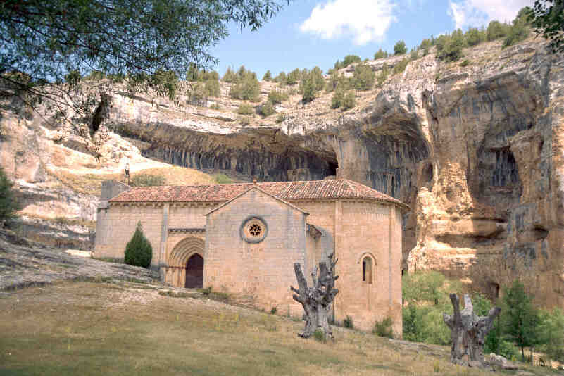 Cañón del río Lobos en la ermita de San Bartolomé. Tomada por --JMSE el 3 de julio de 2003 y cedida a Wikipedia.